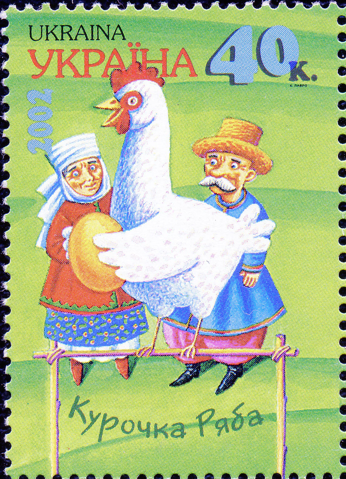 Почтовая марка Украины. 2002. Курочка Ряба